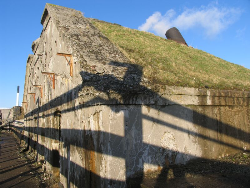 Prøvestensfortet (Prøvestenen), Travers med magasin og mandskabsrum